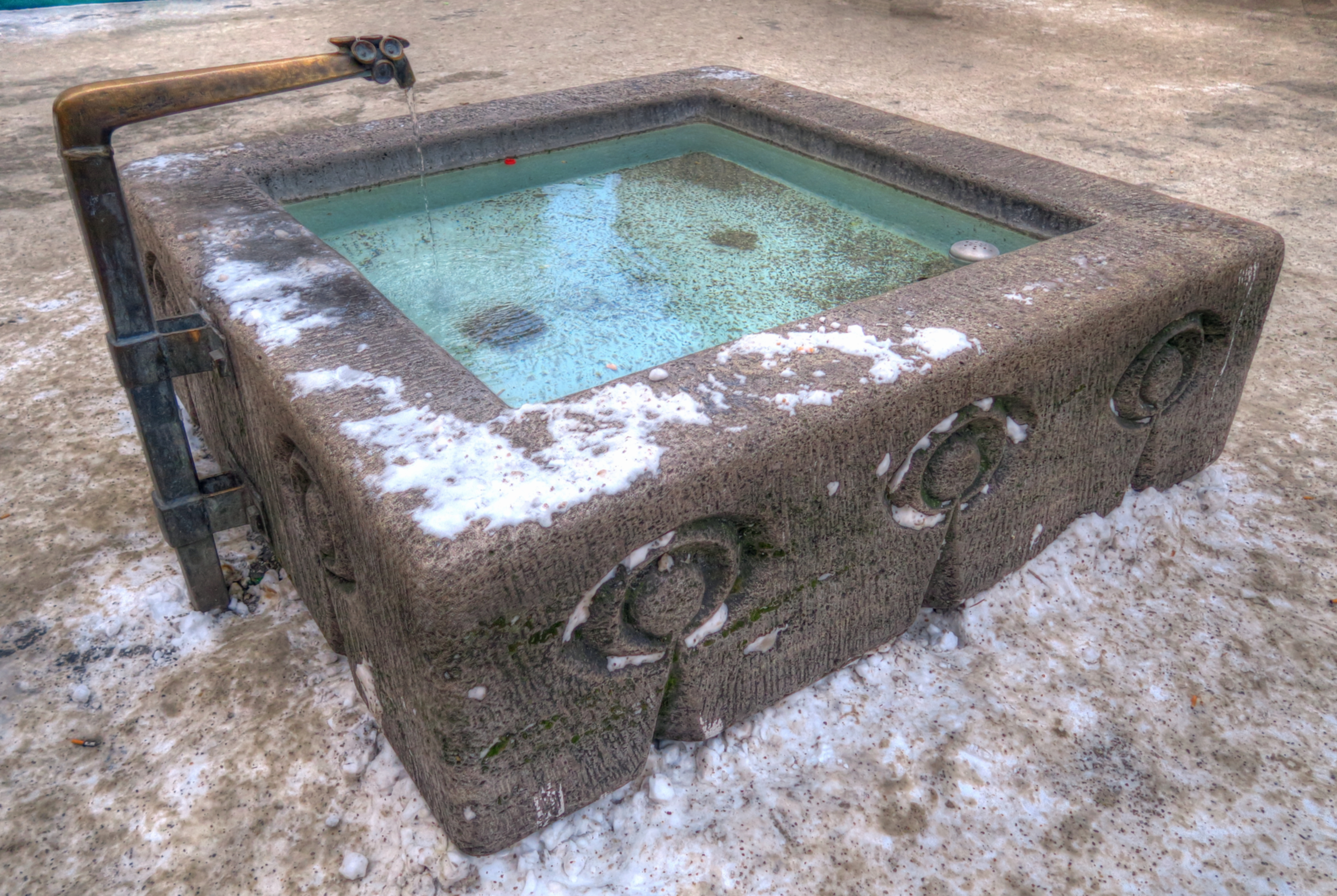 Der Kräutlmarkbrunnen des deutschen Bildhauers Wolf Hirtreiter am Münchner Marienplatz aus dem Jahr 1972 aufgenommen im Januar 2017